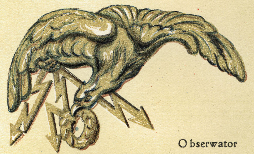 Odznaka Obserwator 1919.